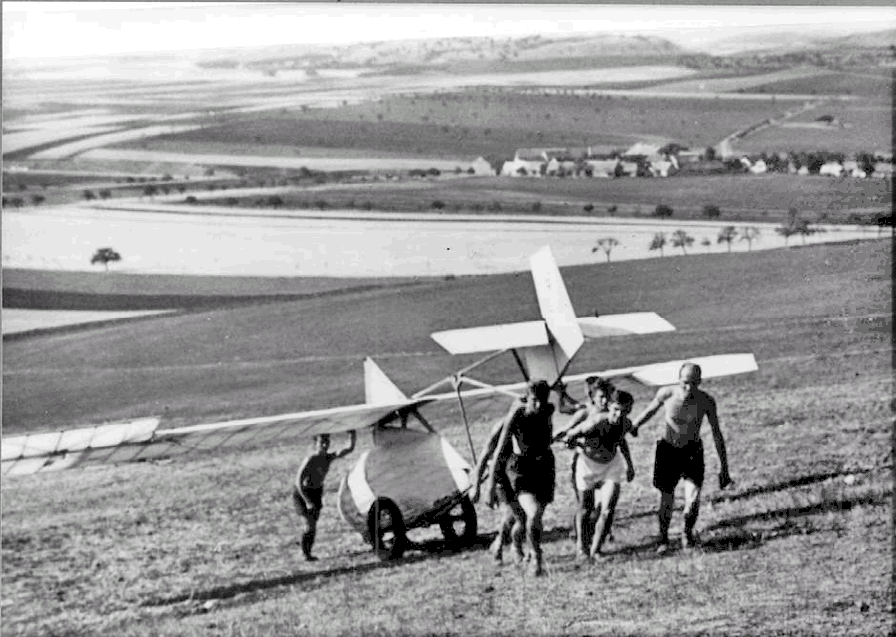 Rannayer Berg 1935, Sommerflugbetrieb der Akaflieg Prag